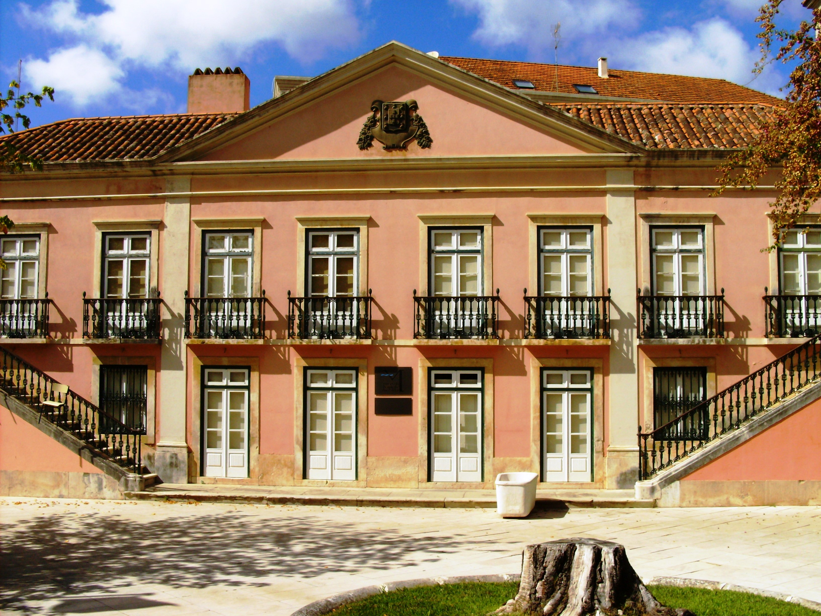 Museu do Hospital e das Caldas, Caldas da Rainha, Portugal.